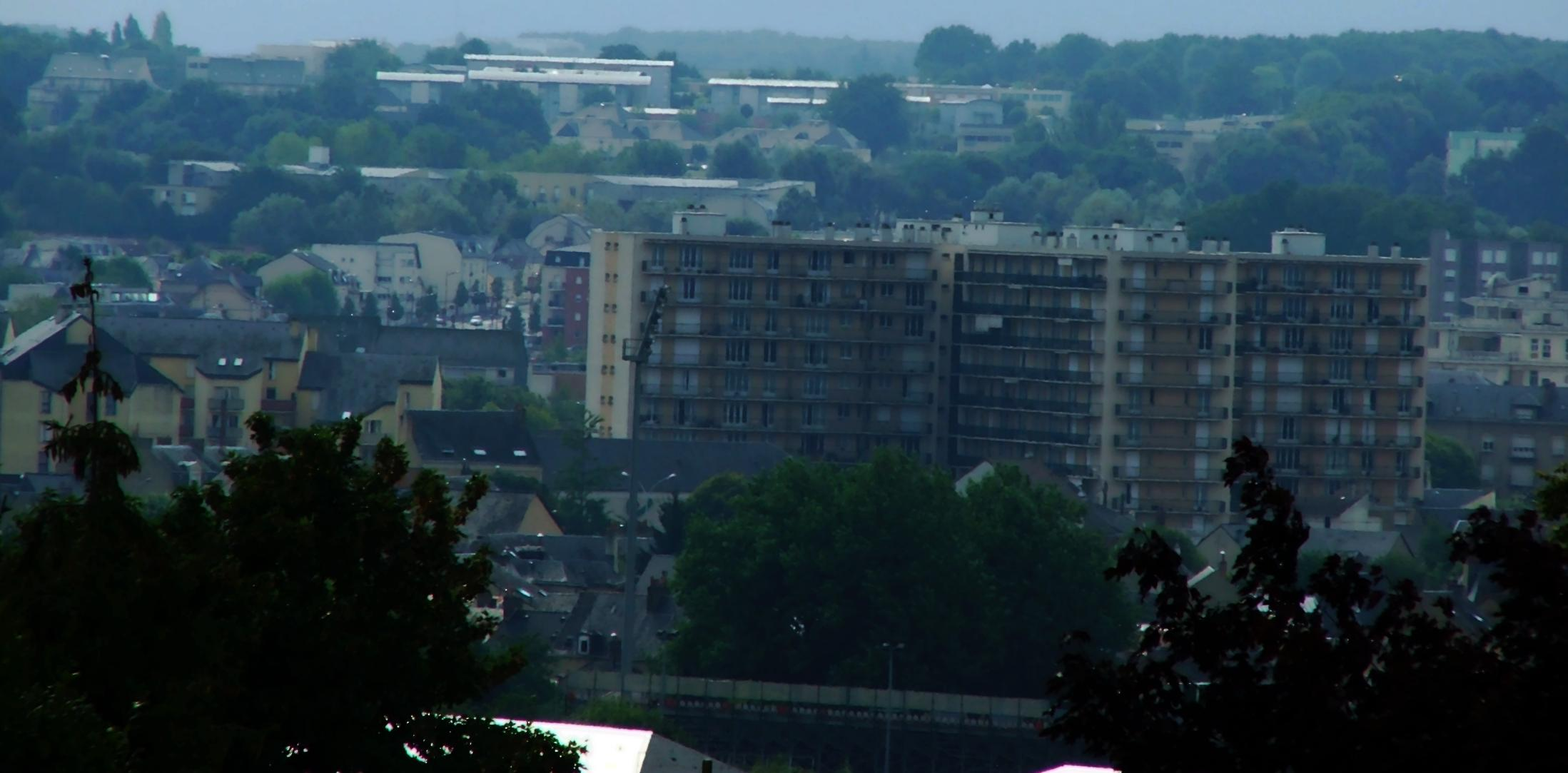 Vue des tours de la chasse-royale au Mans depuis la colline Saint-Vincent.